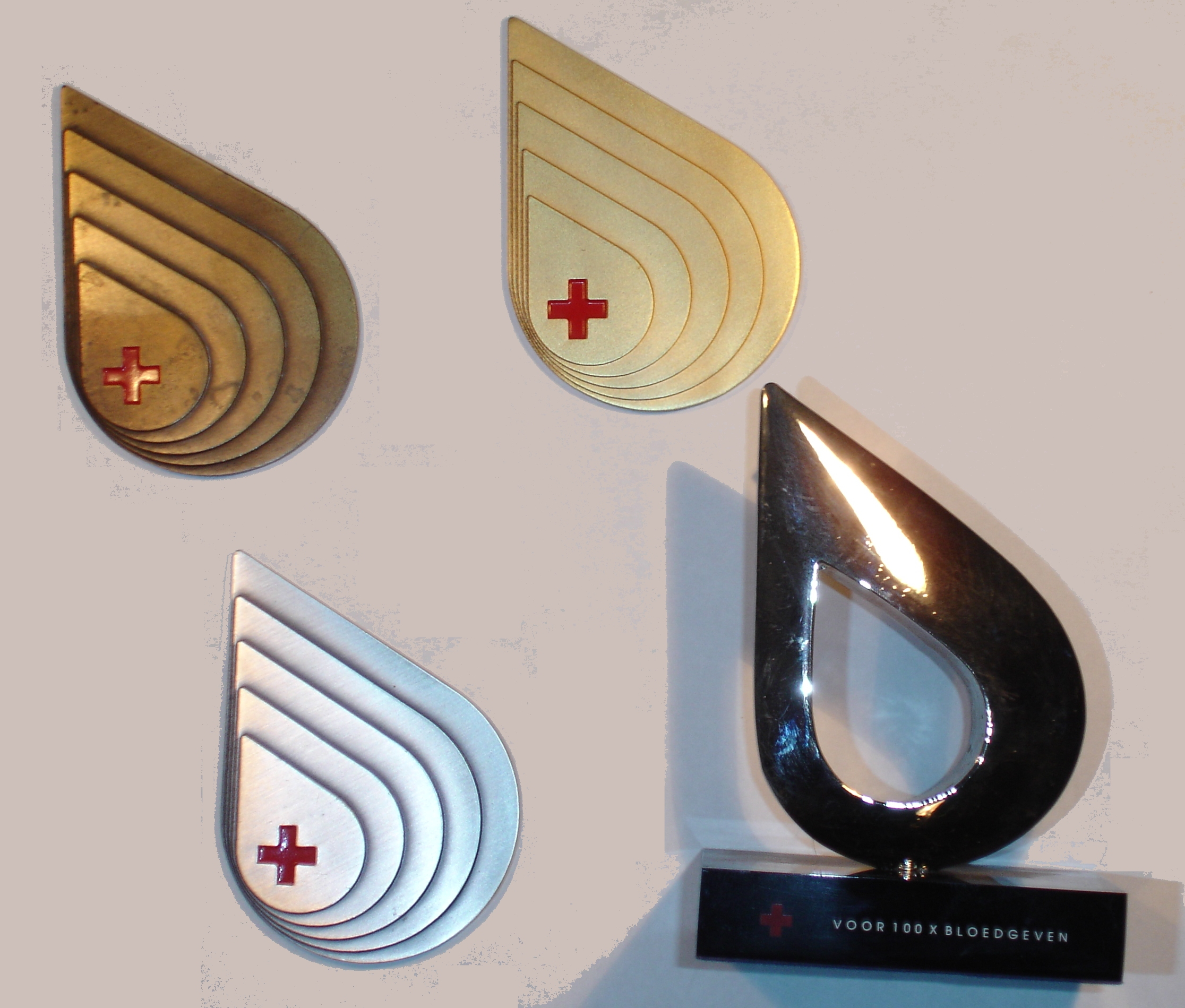 'Plakken' van Sanquin bloedbank